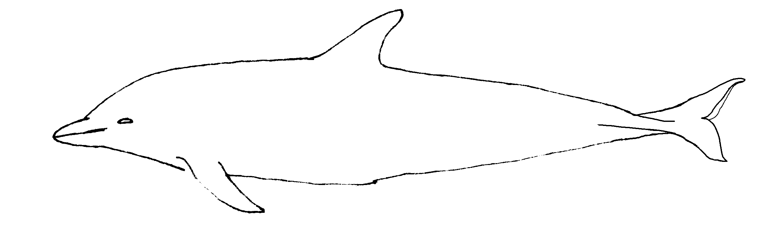 Umrisszeichnung des Streifendelfins, nach Niethammer 1996 selbst erstellt, GNU FDL Darstellung der Fluke etwas verändert --mmr 00:22, 30. Sep 2004 (CEST)